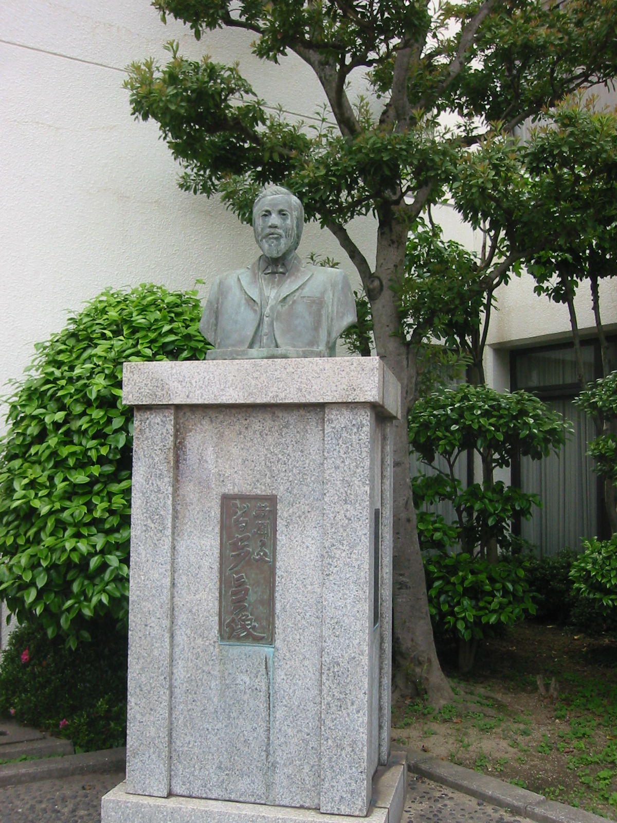 浜田彦蔵